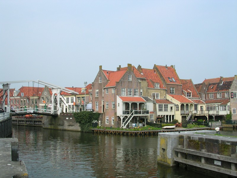 De stad Enkhuizen. The city of Enkhuizen.